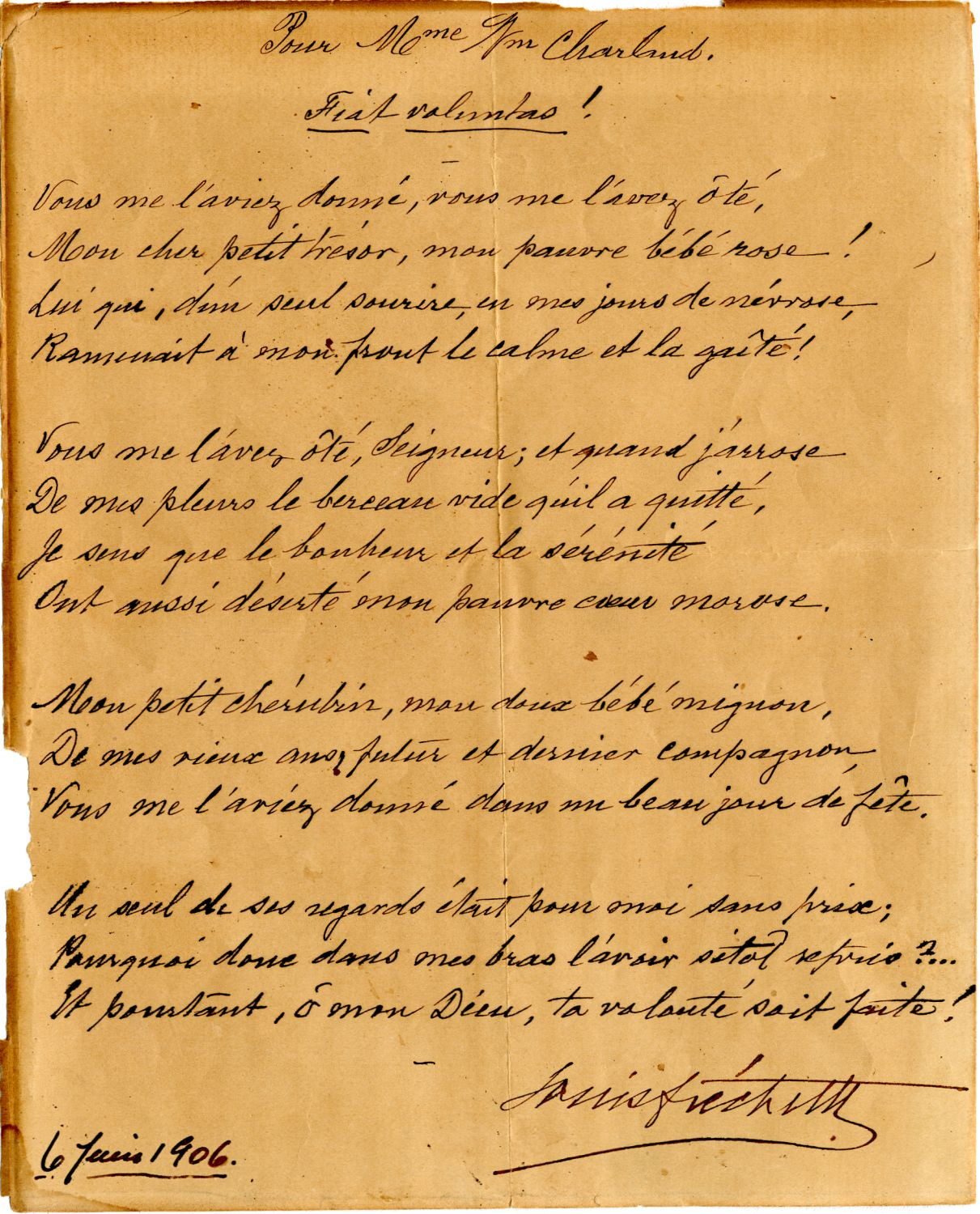 Poème intitulé Fiat Voluntas ! Vous me l’aviez donné, vous me l’avez ôté ; Mon cher petit trésor, mon amour blond et rose, Lui qui, d’un seul sourire, en mes jours de névrose, Ramenait à mon front le calme et la gaîté ! Vous me l’avez ôté, Seigneur ; et quand j’arrose De mes pleurs le berceau vide qu’il a quitté, Je sens que le bonheur et la sérénité Ont aussi déserté mon pauvre cœur morose. Mon chérubin chéri, mon doux bébé mignon, De mes vieux ans futurs et dernier compagnon, Vous me l’aviez donné dans un beau jour de fête. Un seul de ses regards était pour moi sans prix ; Pourquoi donc en mes bras l’avoir si tôt repris ?... Et pourtant, ô mon Dieu, ta volonté soit faite !